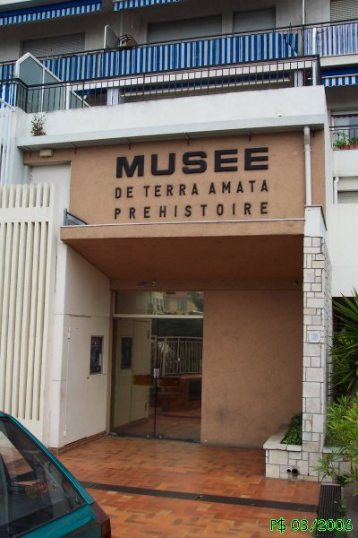 Nice-riquier et port Impasse Terra Amata